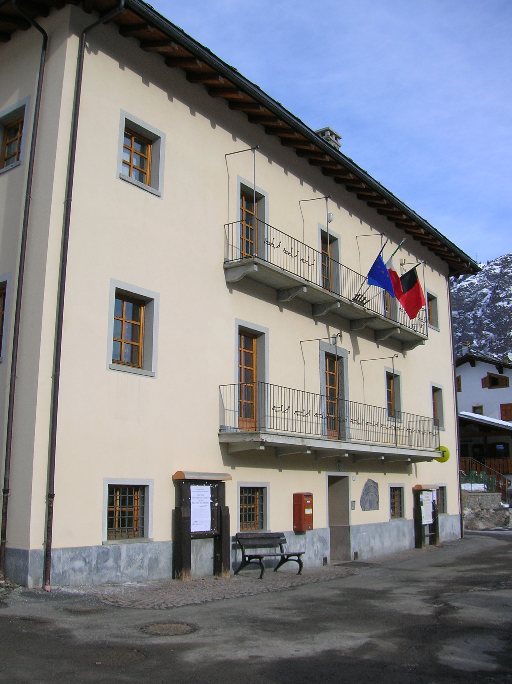 municipio di Saint-Rhémy-en-Bosses, Valle d'Aosta, Italia.